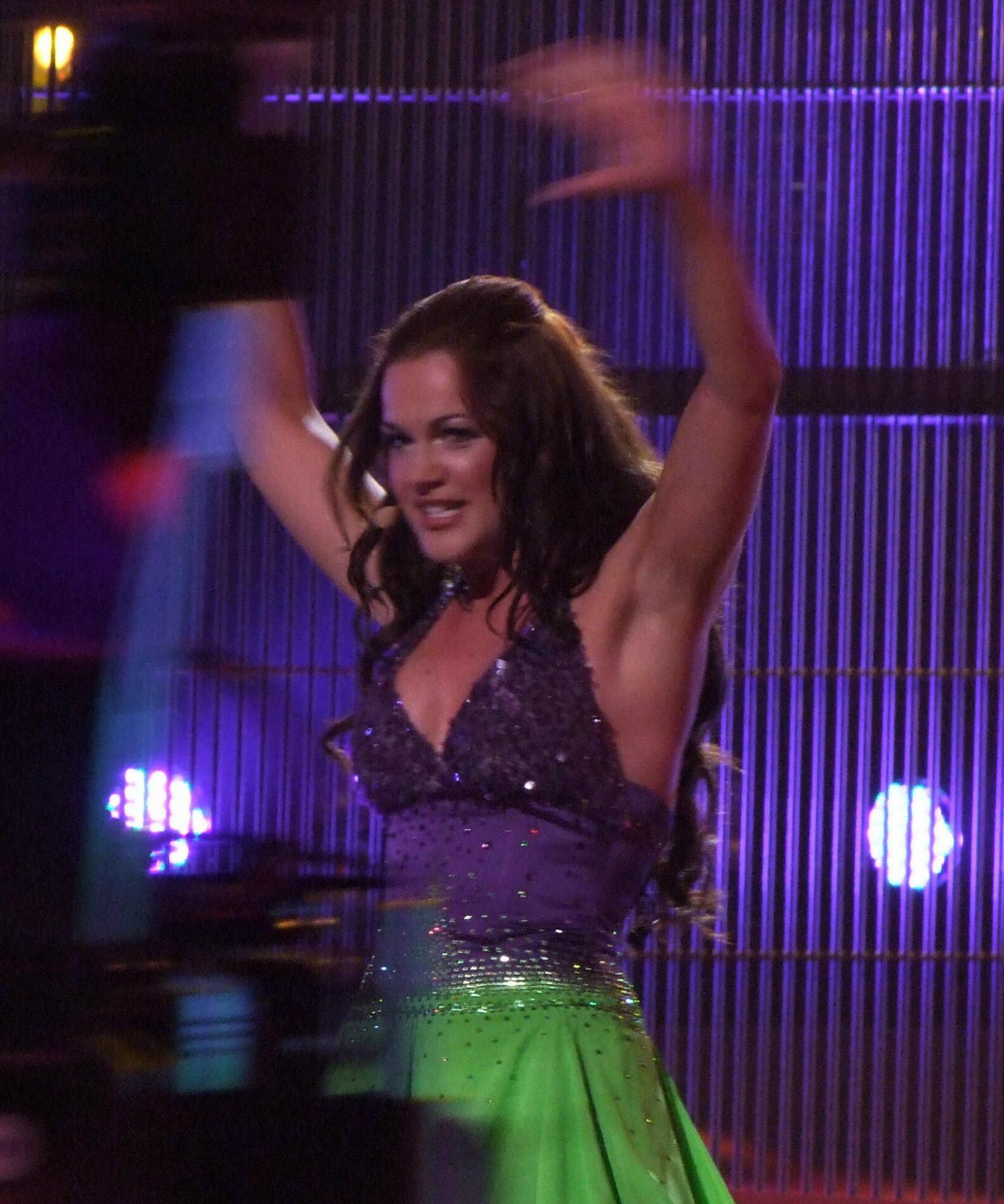 Eurovision Song Contest 2008, 1st semifinalSlovenia: Rebeka Dremelj - Vrag naj vzame